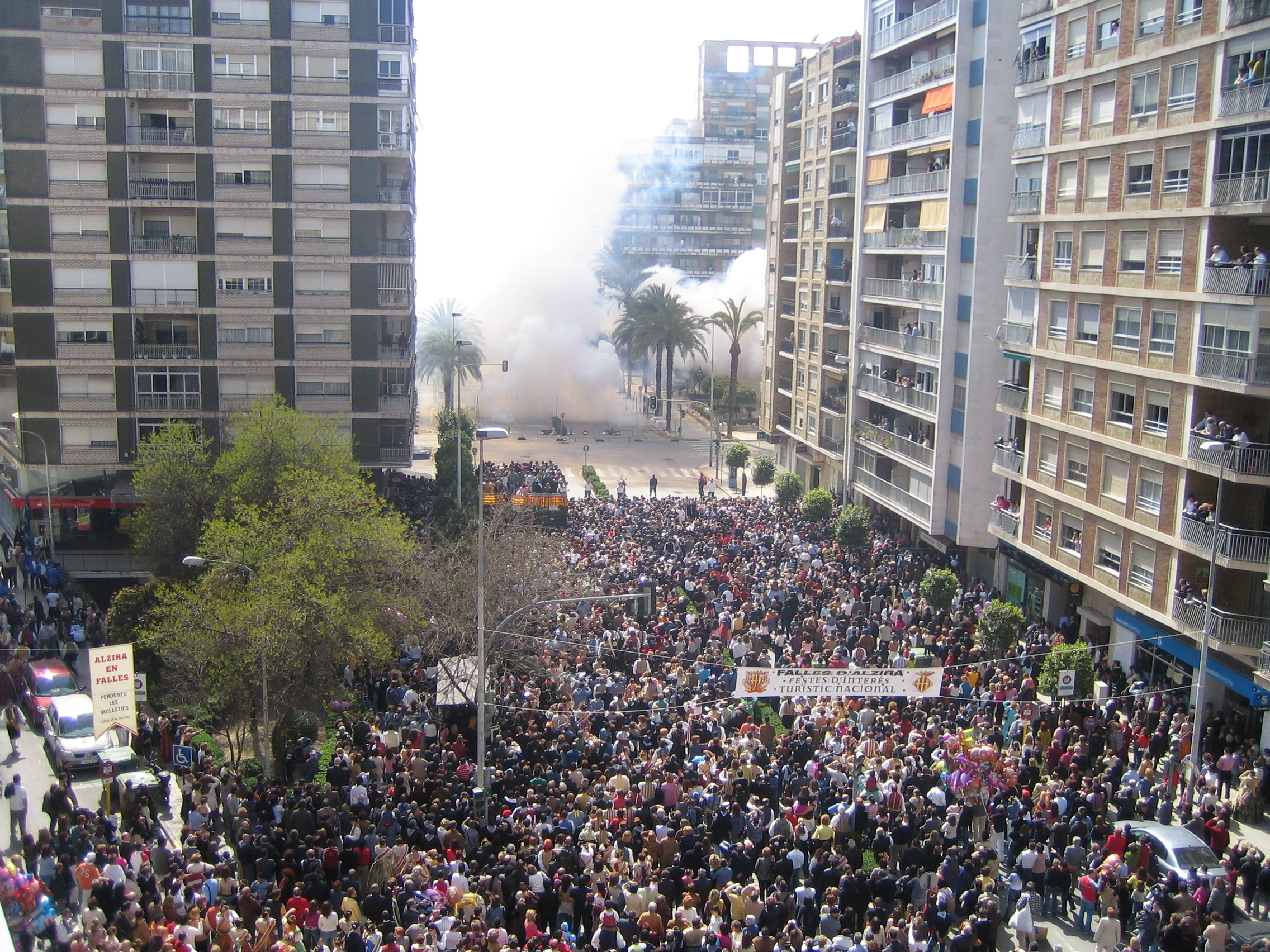 Disparo de una mascletà en las fiestas de Fallas en Alzira (España).